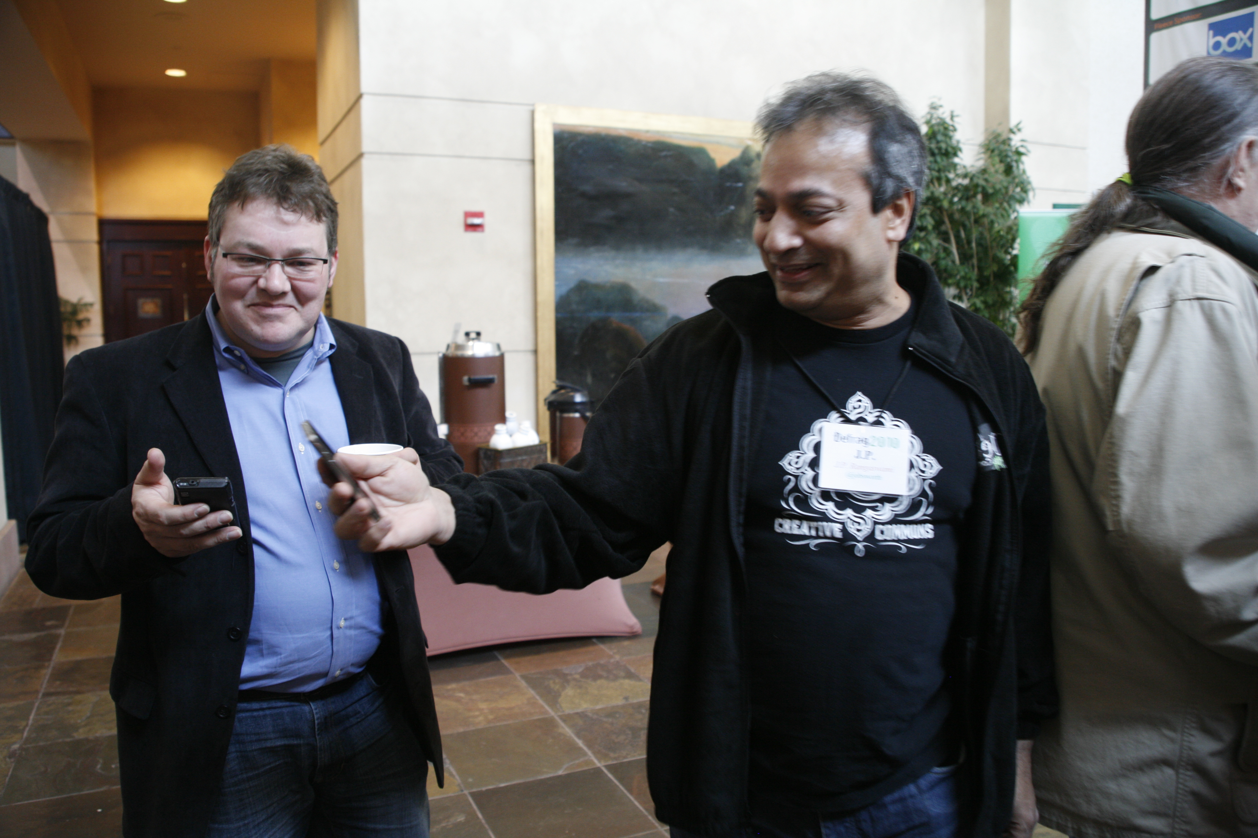 Kevin Marks, JP Rangaswami at Defrag 2010, Colorado